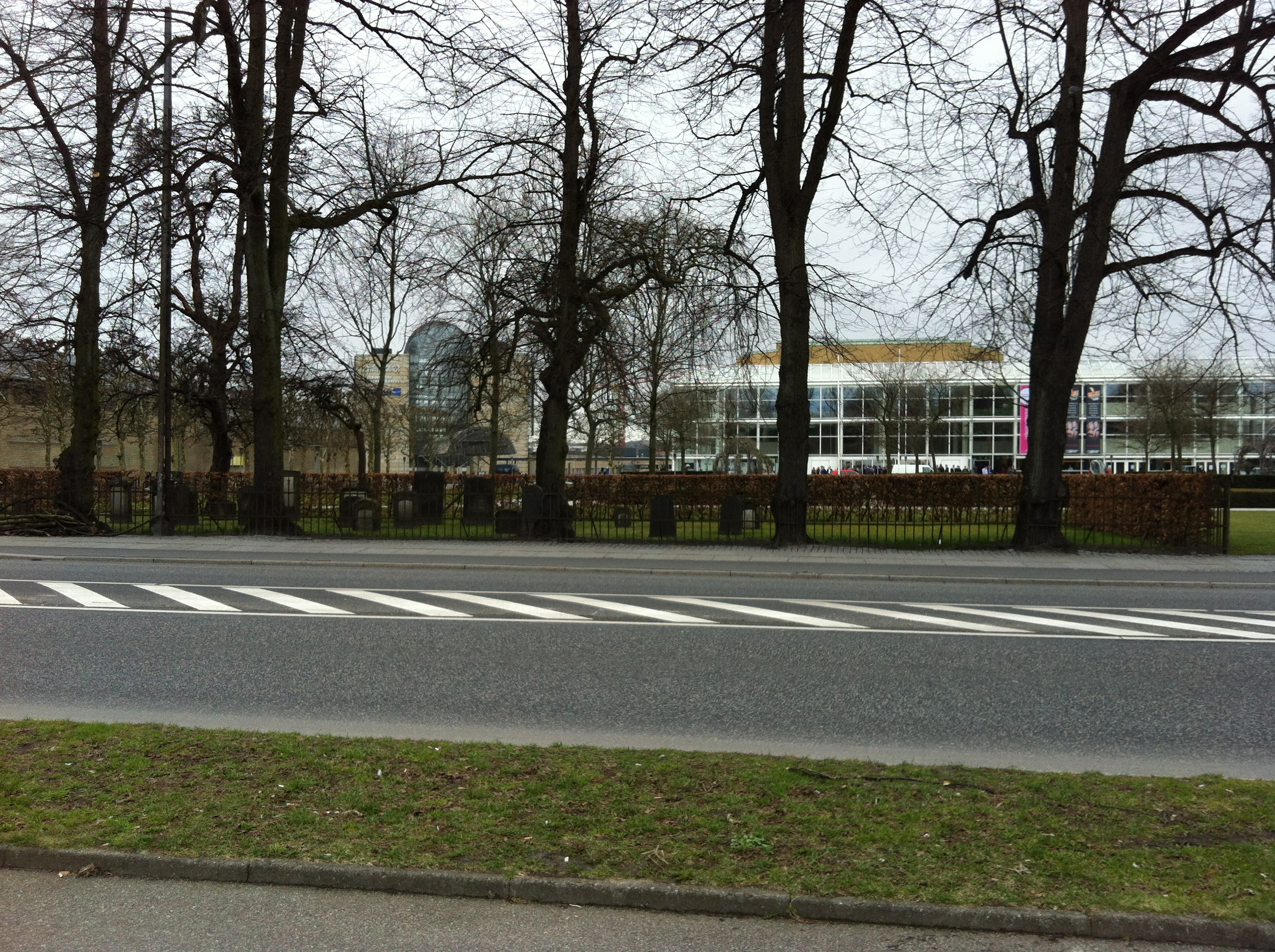 Jødiske Kirkegård i Aarhus